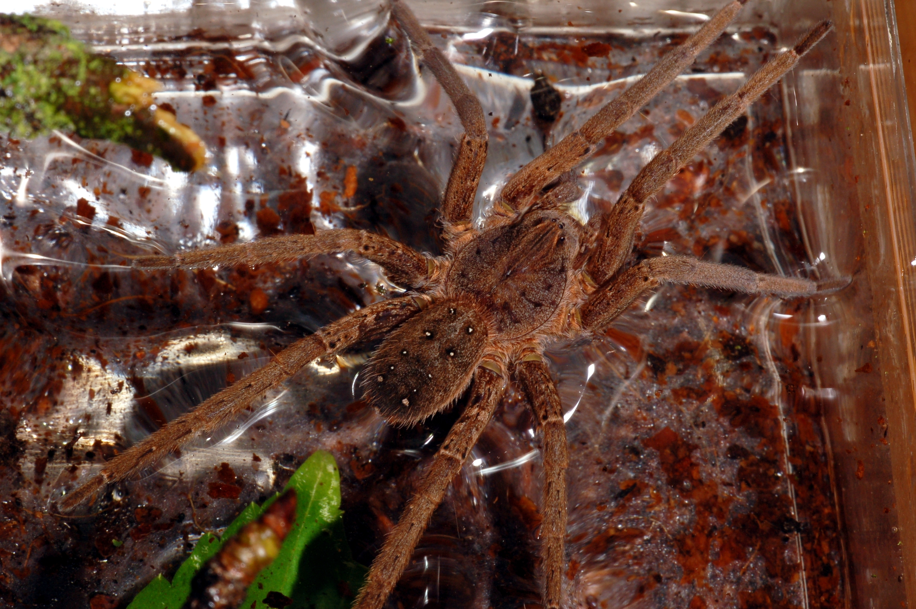 Wasserjagdspinne Ancylometes bogotensis (Fam. Ctenidae) in Gefangenschaft, Museum Wiesbaden, Deutschland